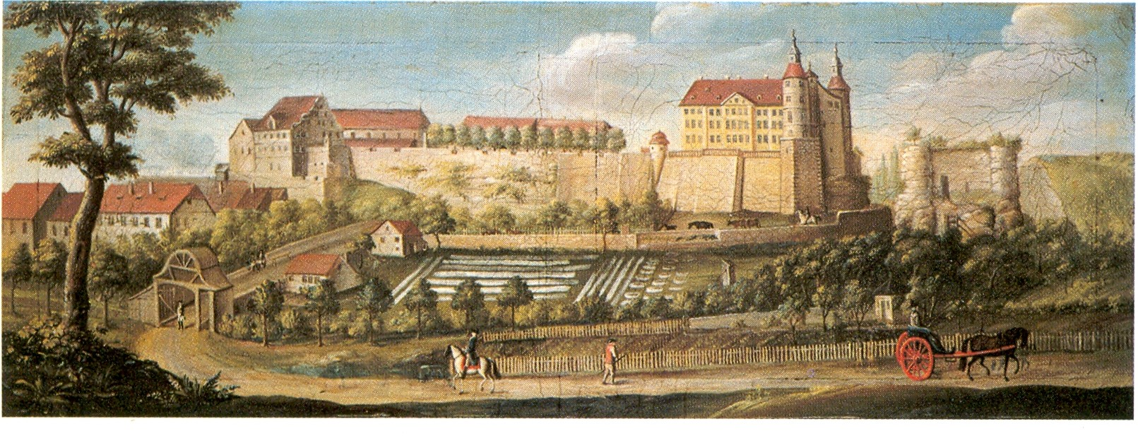 Ansicht des Mömpelgarder Schlosses im 18. Jhd., Musée Beurnier, Montbéliard